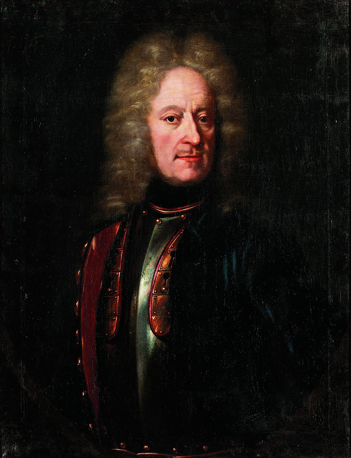 Портрет работы шведского художника Юхана Хенрика Ведекинда (JOHAN HEINRICH WEDEKIND 1674-1736). Размеры оригинала Датирован 1710 годом